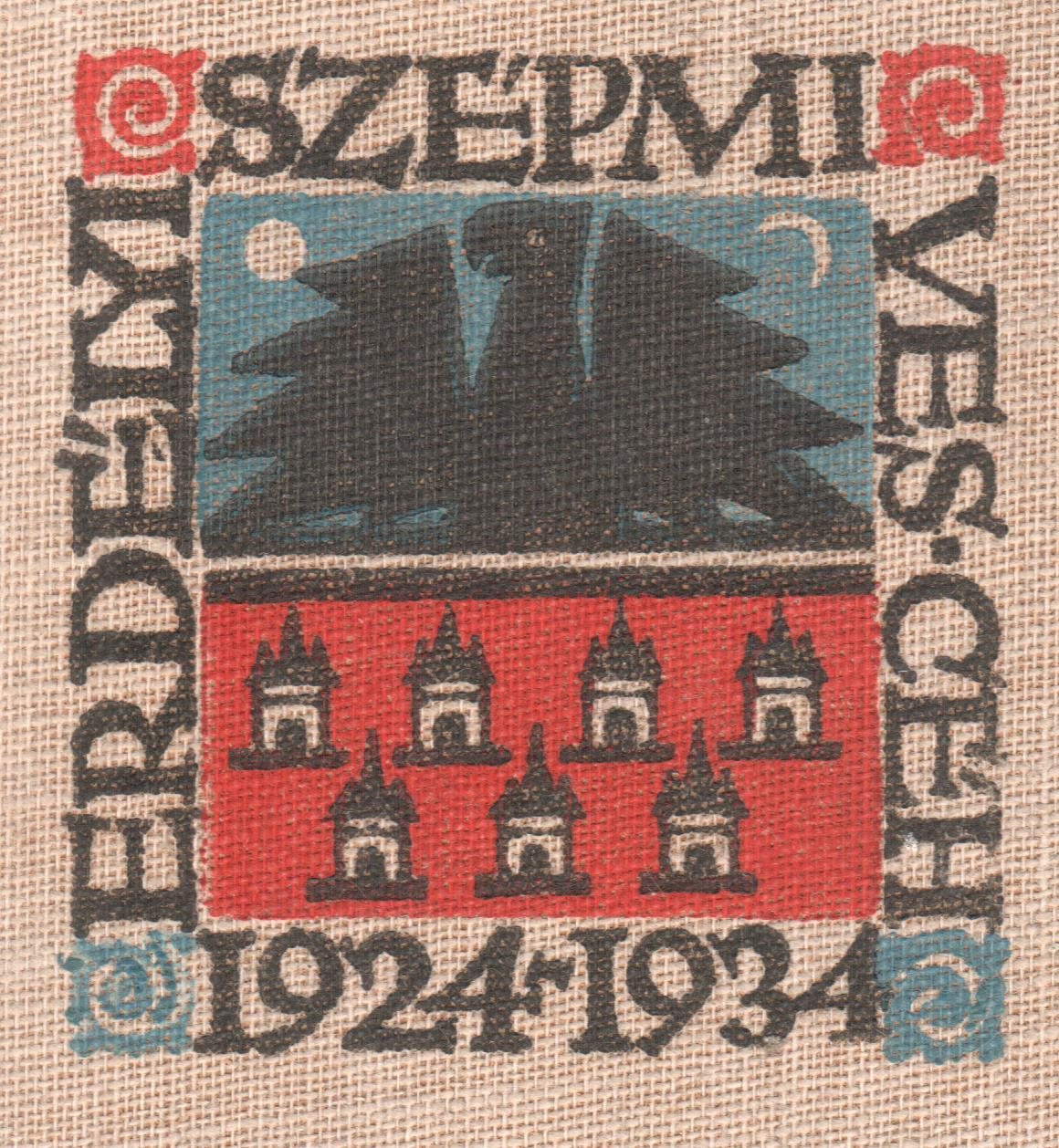 Az Erdélyi Szépmíves Céh 10 éves jubileumára kiadott díszkiadás fedőlapja. (Tompa Lászlóː Ne félj ǃ (összegyűjtött költemények). Kolozsvár, 1934.